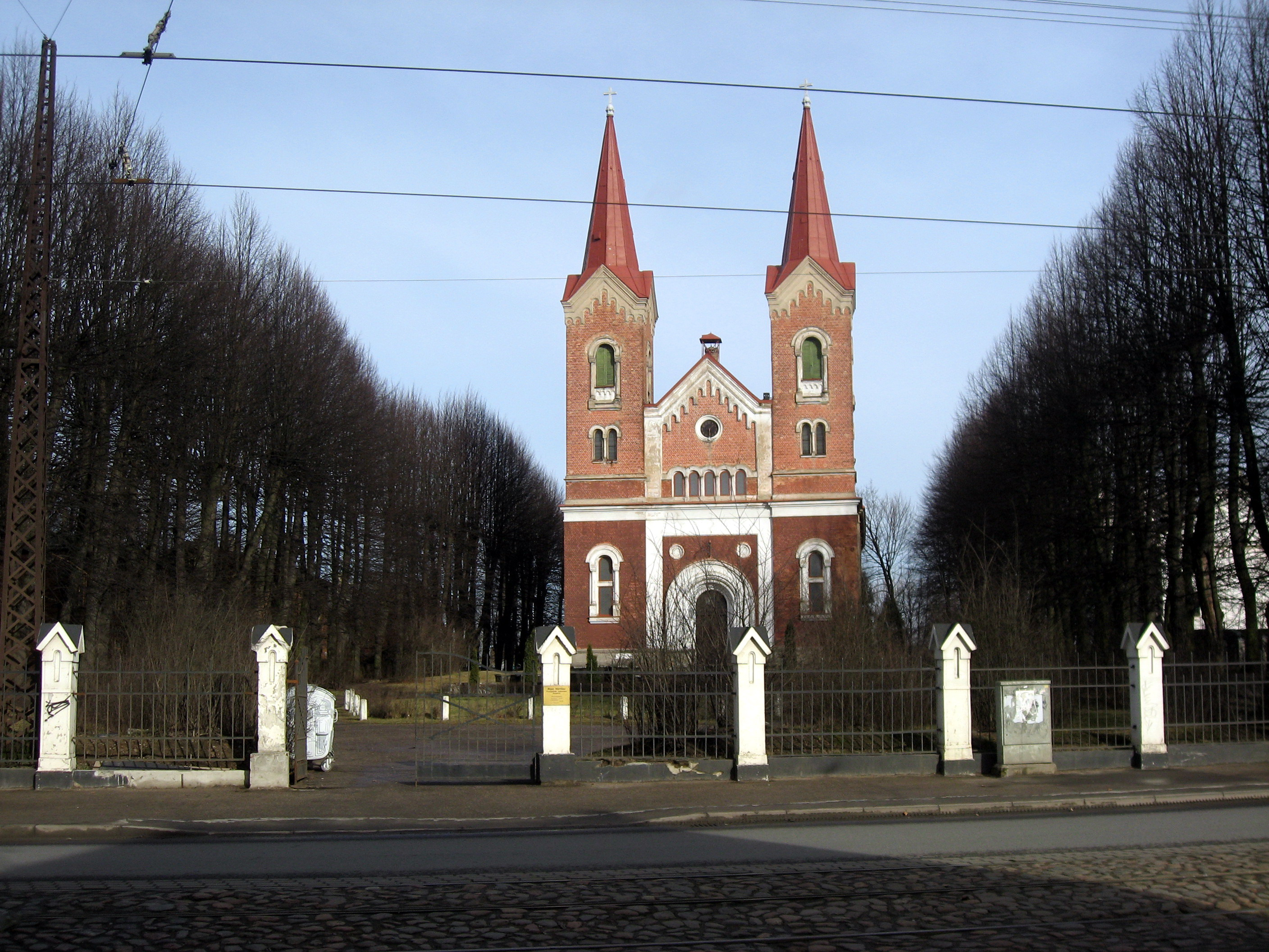 Evaņģēliski Luteriskā Mārtiņa baznīca